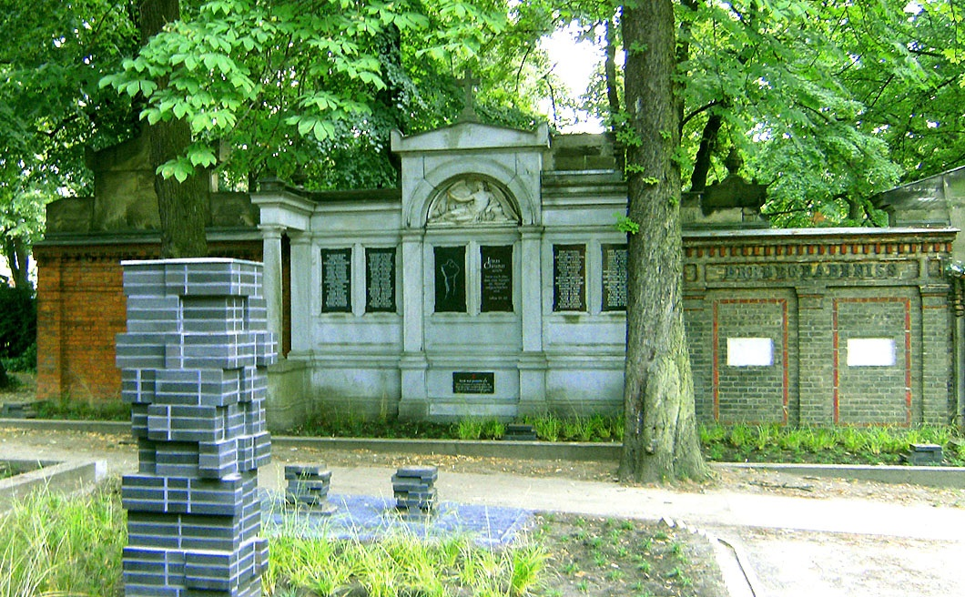 Gemeinschaftsgrabstelle Denkmal positHIV auf Alter St.-Matthäus-Kirchhof 2015 mit neuer Gestaltung. Foto Ludger Wekenborg/StMatthaeus